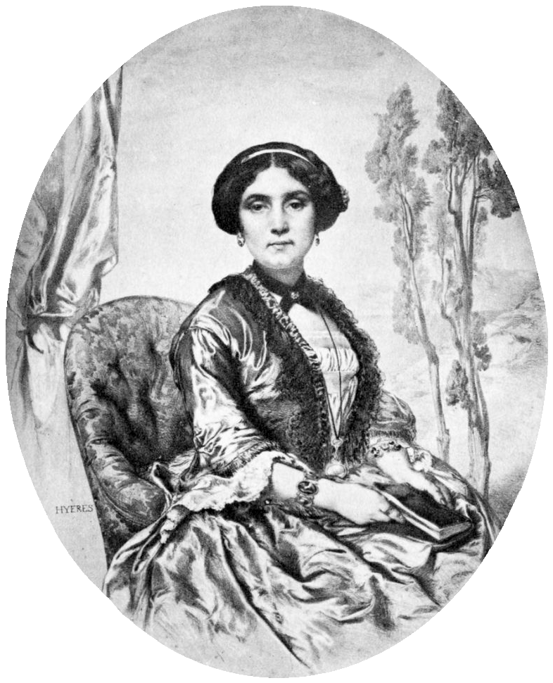 Lithographie par Jules Laurens